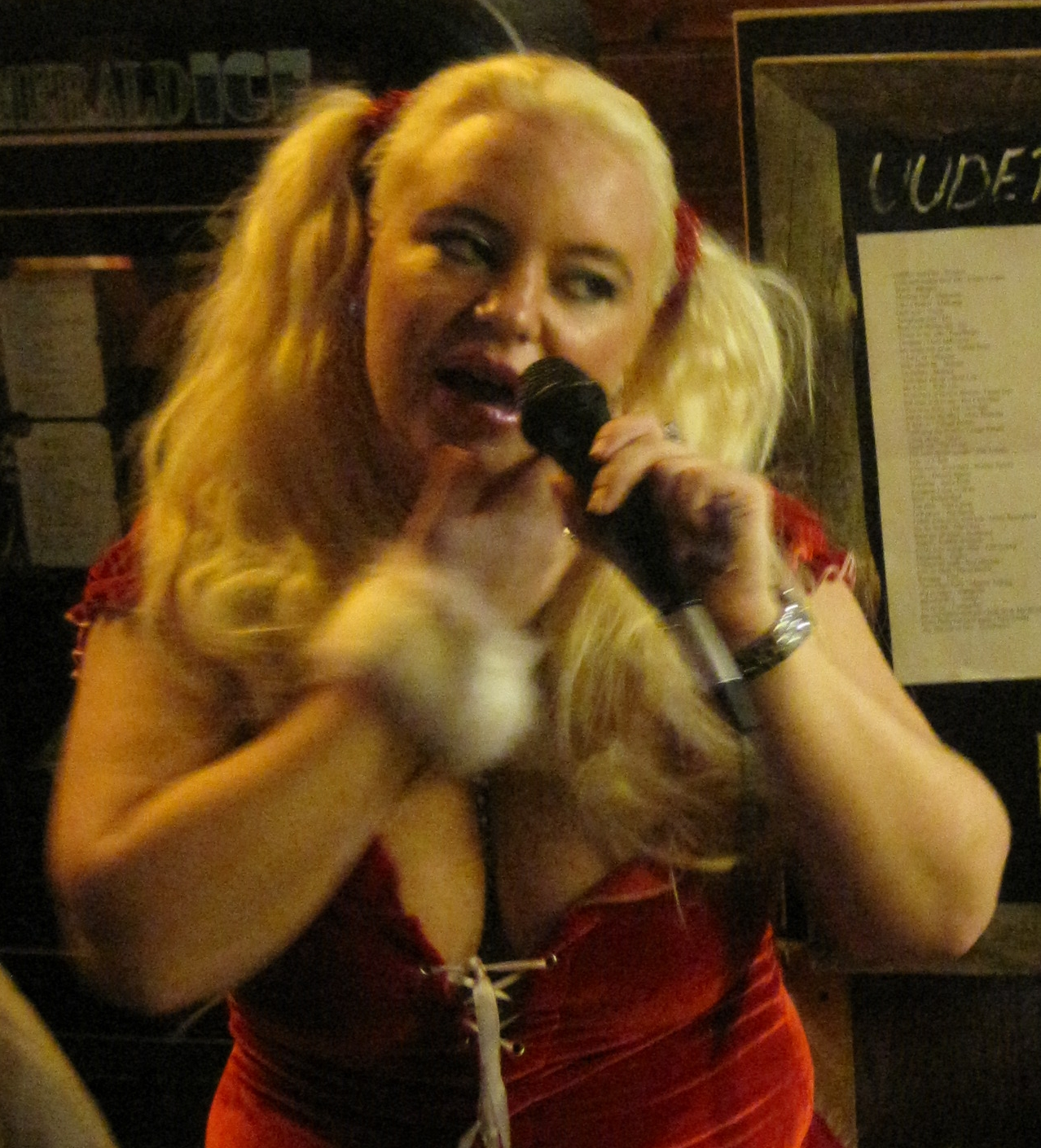 Johanna Tukiainen esiintymässä Kannel Pubissa, Kannelmäessä, Helsingissä 11. joulukuuta 2010.